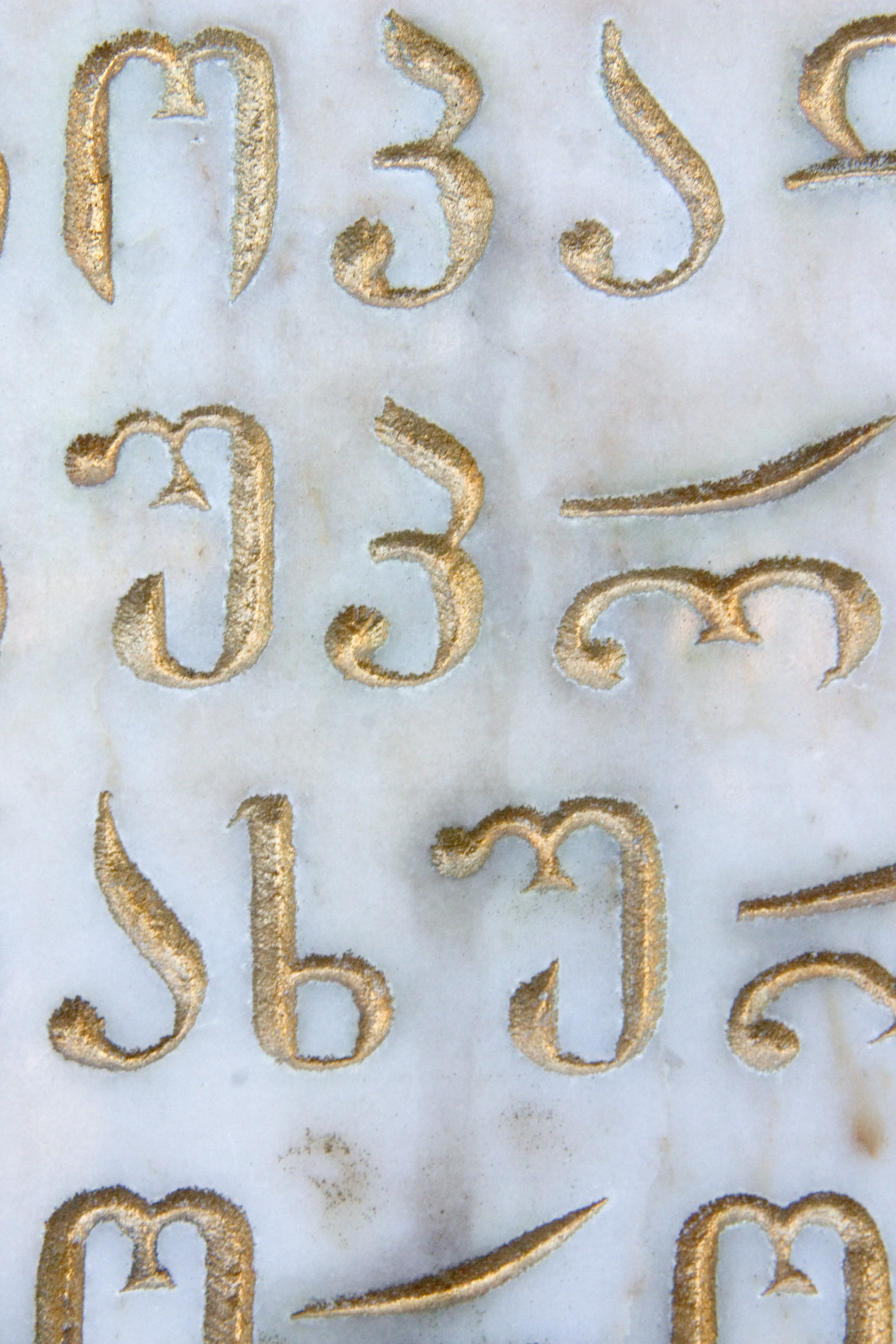 Abkhaziawar memorial in Tbilisi Georgia